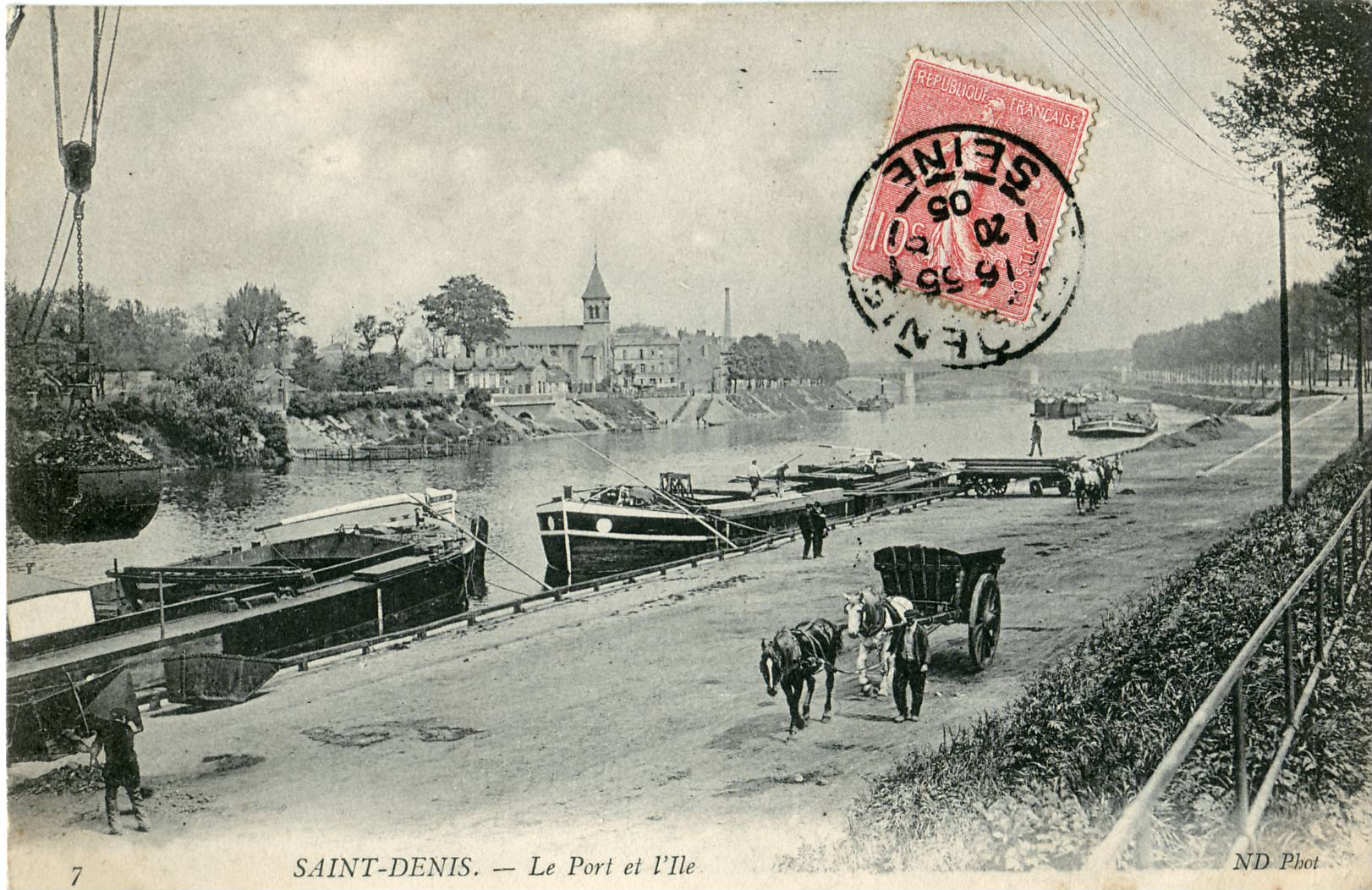 Carte postale ancienne éditée par NF N°7 SAINT DENIS : Le port et l'Ile-Saint-Denis